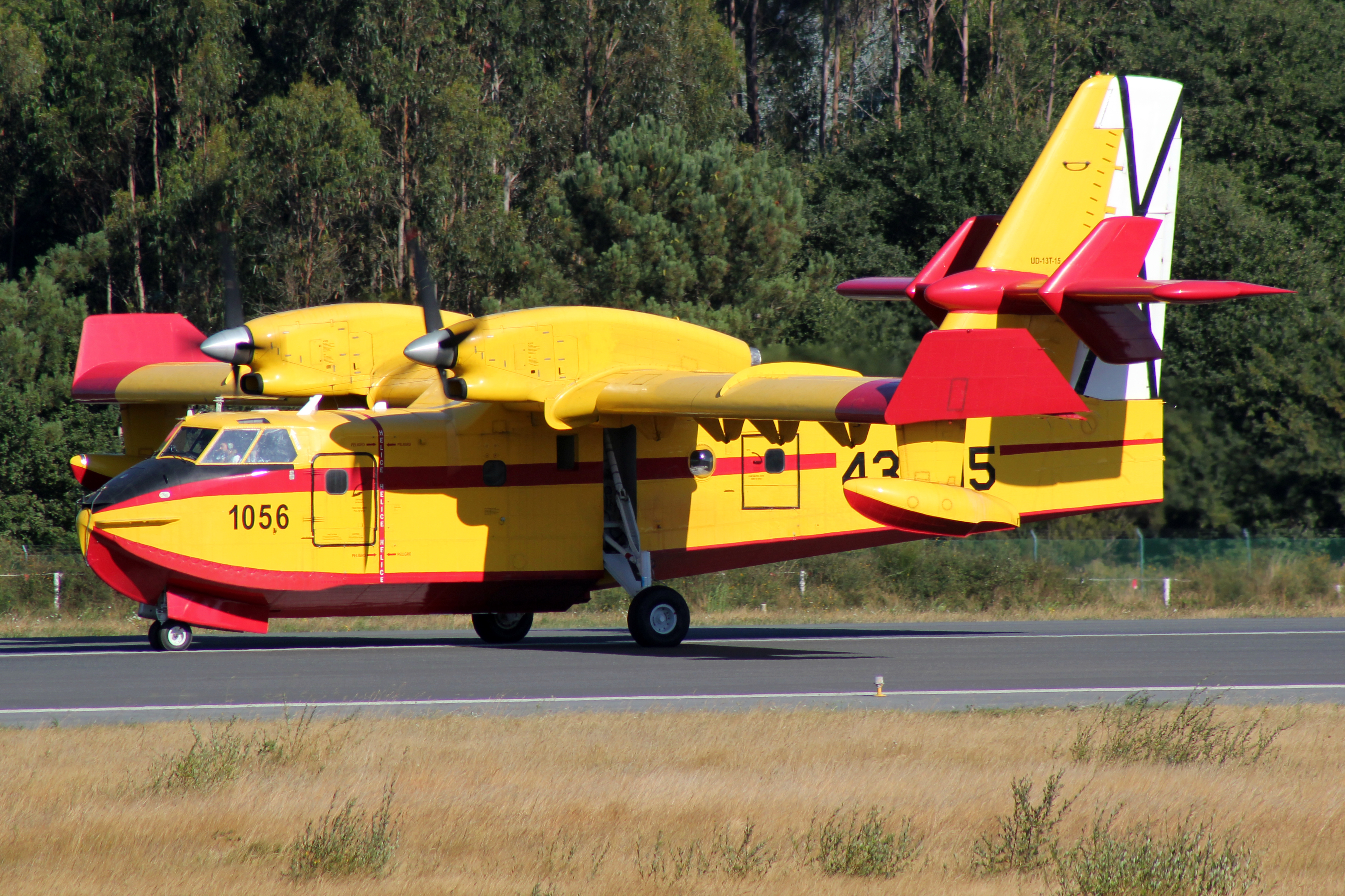 Canadair CL215T do Exército do Aire español no aeroporto de Santiago de Compostela.